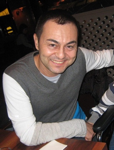 Şarkıcı Serdar Ortaç